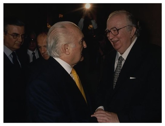 Incontro tra il Presidente della Camera dei Deputati Oscar Luigi Scalfaro e il Presidente del Senato Giovanni Spadolini